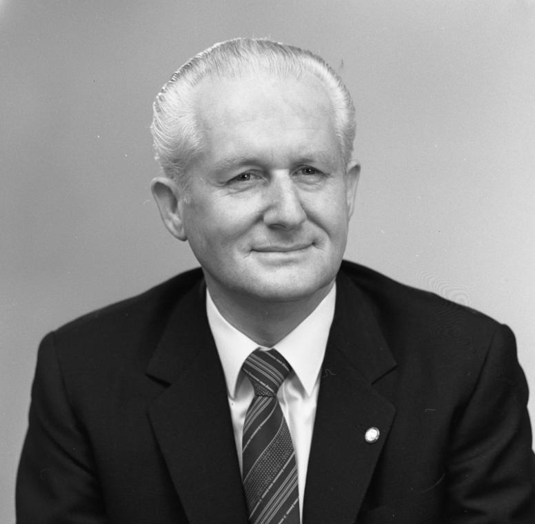 Günter Mittag ADN-ZB/Brüggmann 29.6.1981 [Herausgabedatum] Mittag, Günter Mitglied des Politbüros und Sekretär des ZK der SED, Mitglied des Staatsrates. [Porträt Günter Mittag] Abgebildete Personen: Mittag, Günter Dr.: Stellvertretender Staatsratsvorsitzender, Politbüro des ZK der SED, FDGB, DDR (PND 11897629X)